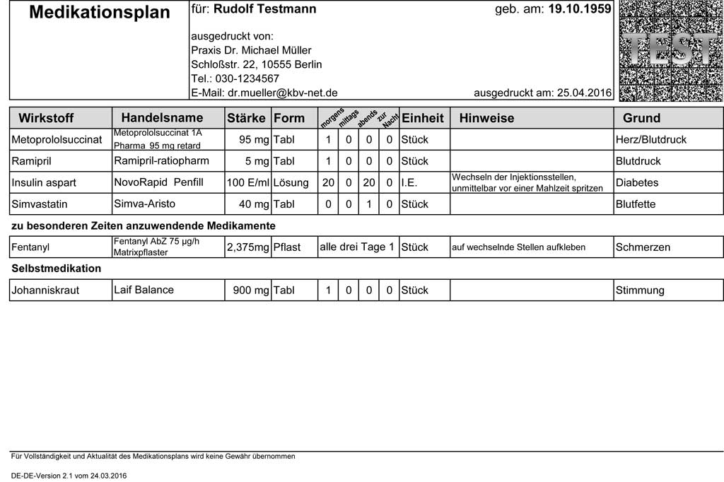 Beispiel für einen Medikationsplan